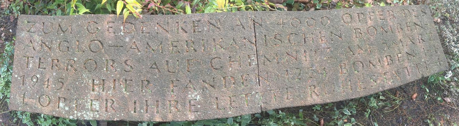 Inschrift: Zum Gedenken an 4000 Opfer des anglo-amerikanischen Bombenterrors auf Chemnitz am 5. März 1945. Hier fanden 1224 Bombenopfer ihre letzte Ruhe